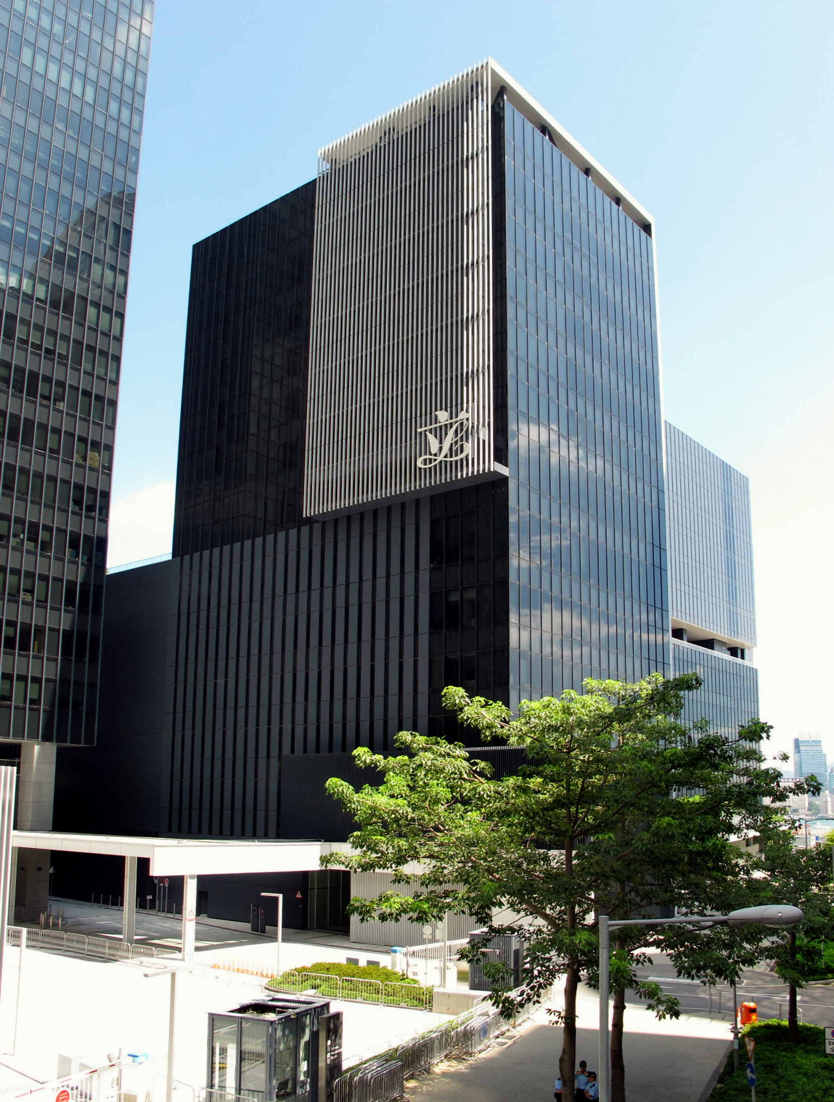 立法會綜合大樓辦公室樓